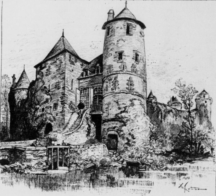 Fougères : l'entrée du château (lithographie d'Albert Robida publiée dans "La vieille France, Bretagne" vers 1900). De gauche à droite: les tours du Hallay, de la Haye-Saint-Hilaire et de de Guémadeuc.